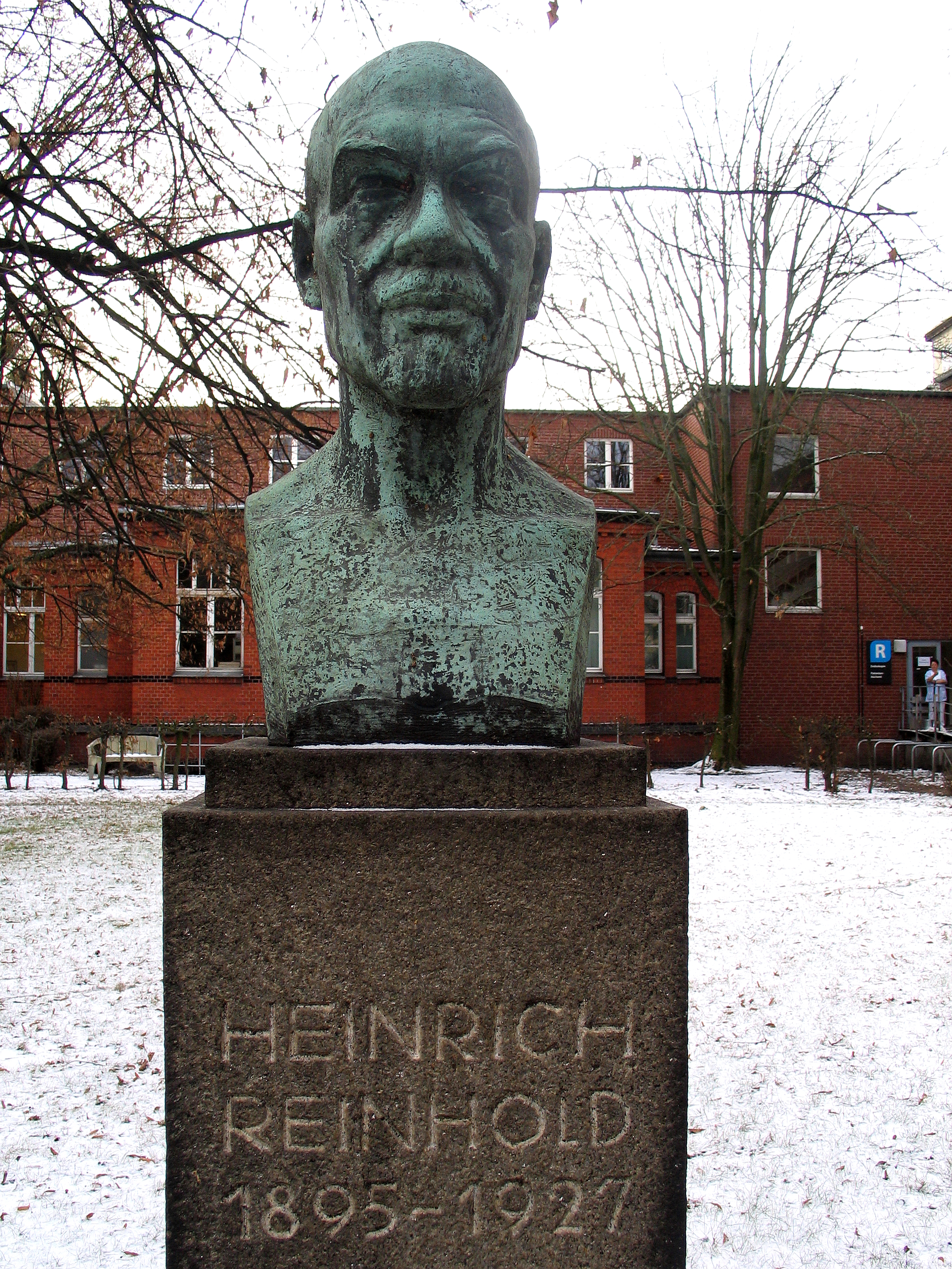 Büste des Geheimen Medizinalrates und ersten Leiter des seinerzeitigen städtischen Zentralkrankenhauses in Hannover, Heinrich Reinhold ...